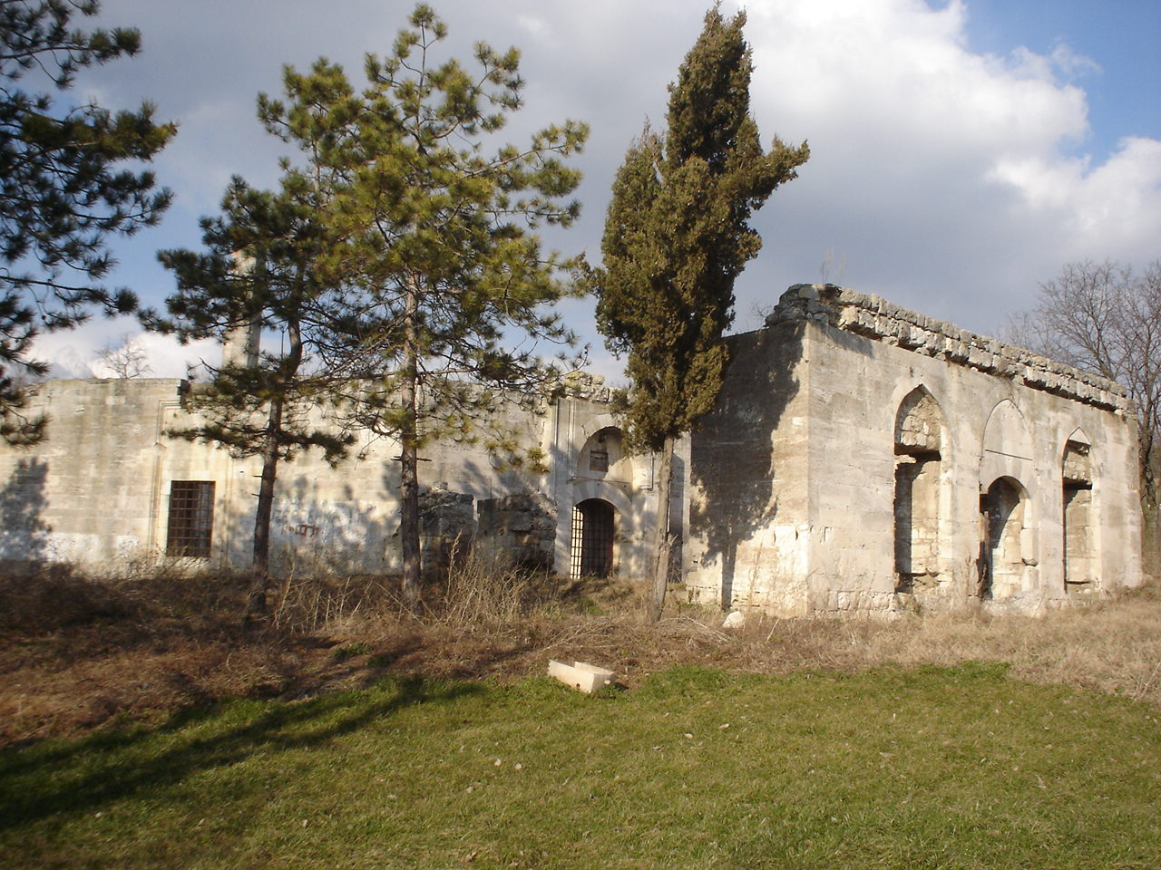 Село Оброчище. Останки от Манастира, 2005 г.